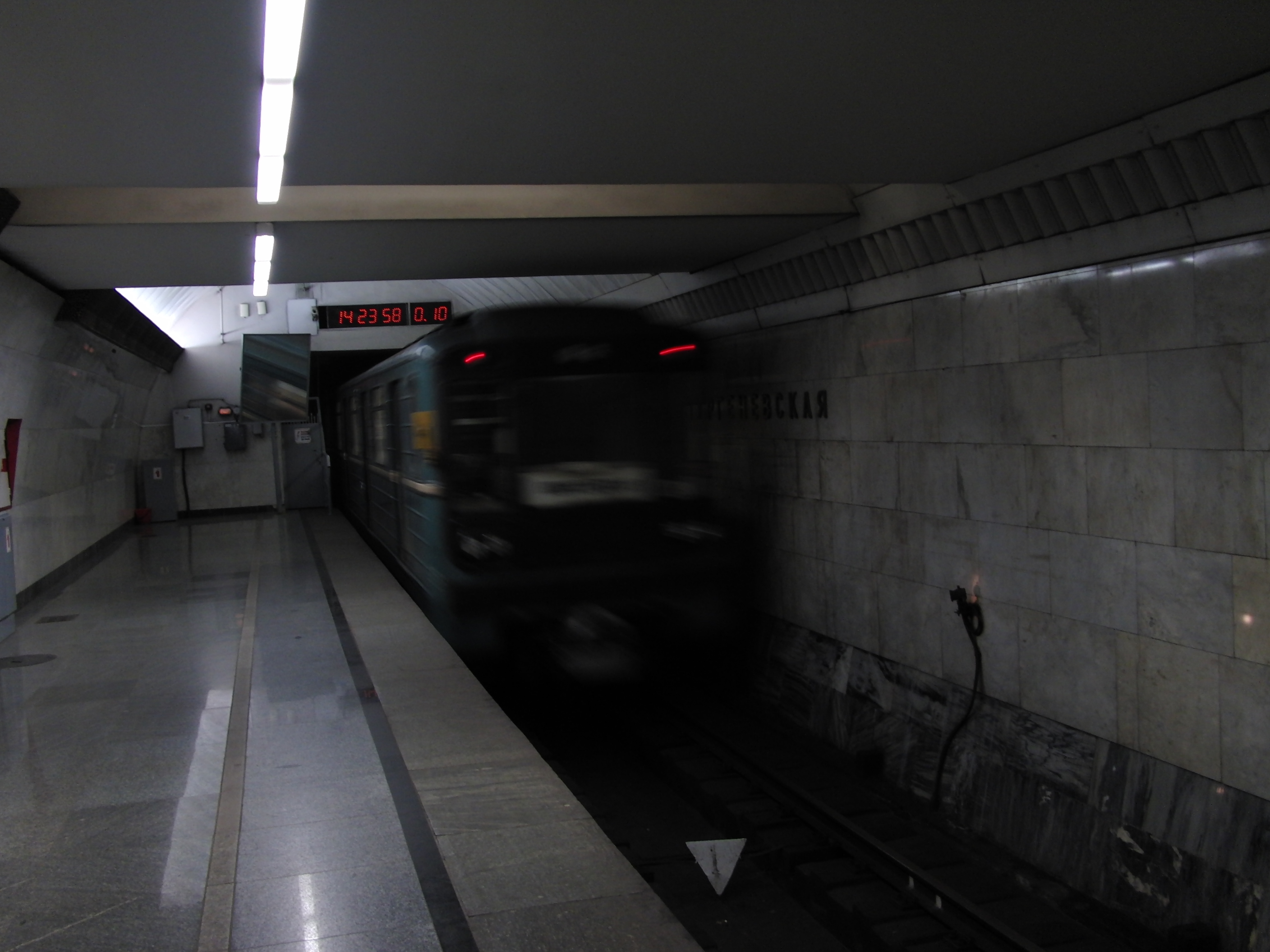 Turgenevskaya (Тургеневская)